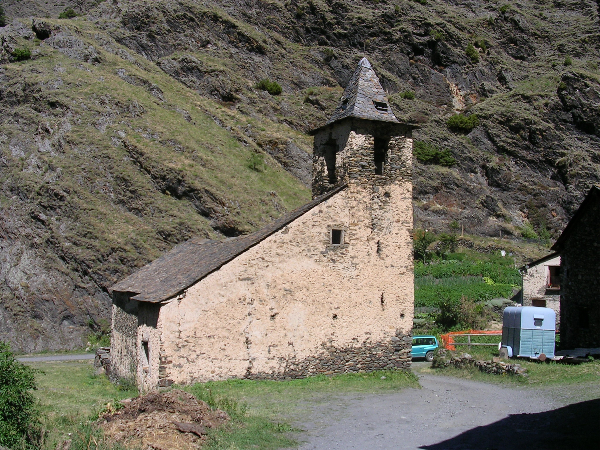 Església de Sant Pere de Tor